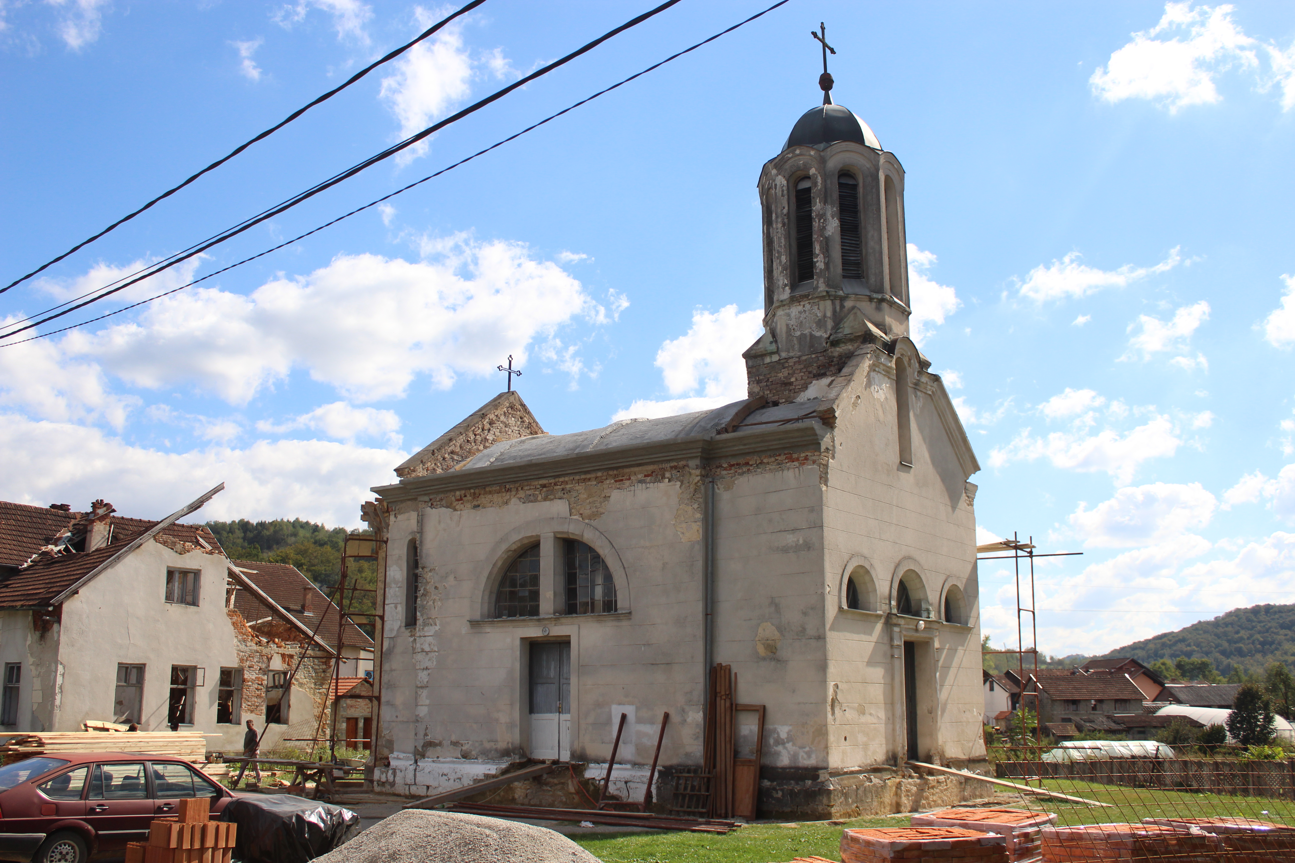 This image was uploaded as part of Trace of Soul 2018. .